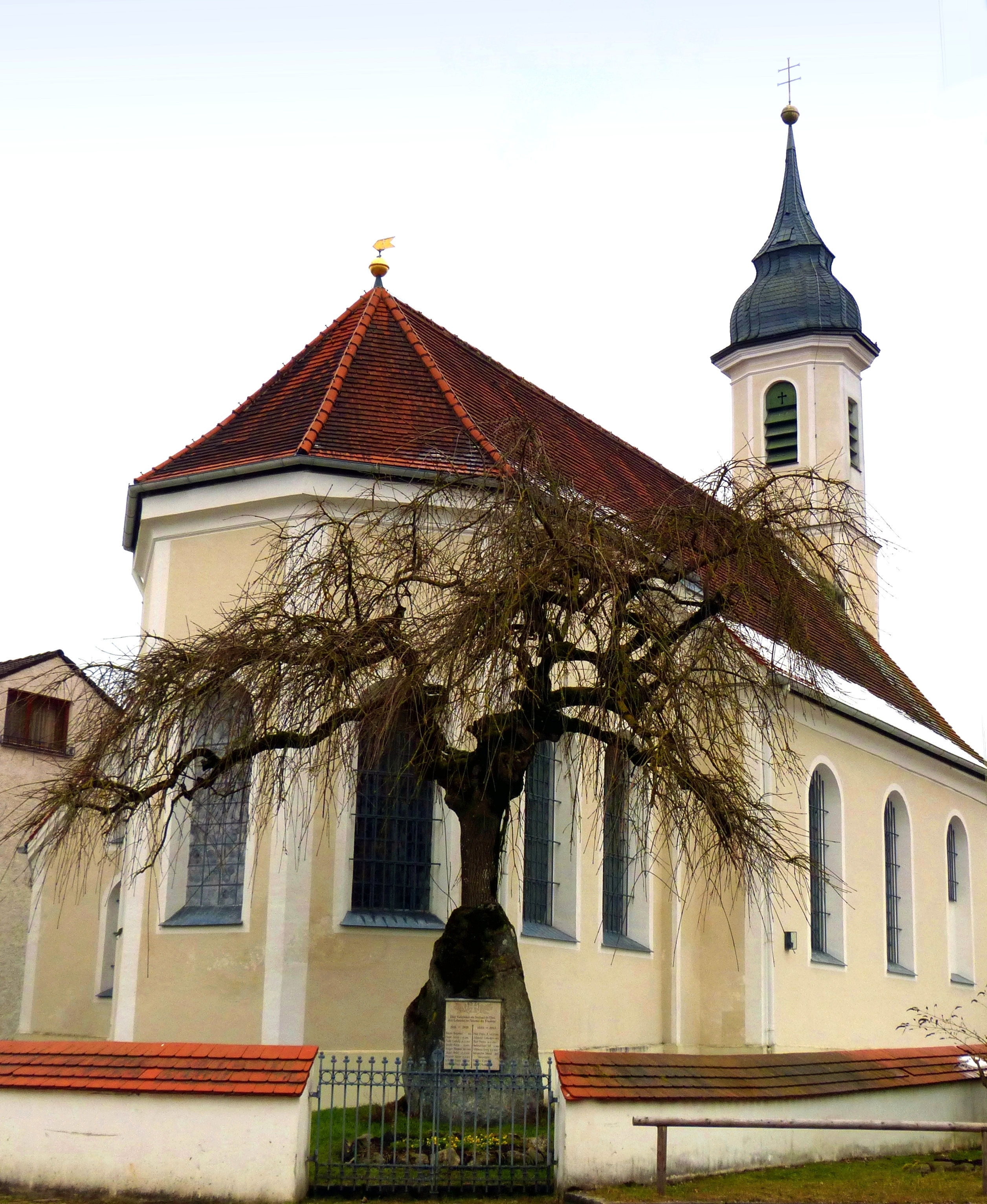 Berg am Starnberger See, OT Farchach. Die katholische Filialkirche St. Martin und St. Nikolaus wurde am Anfang des 18. Jahrhunderts barockisiert. This is a photograph of an architectural monument.